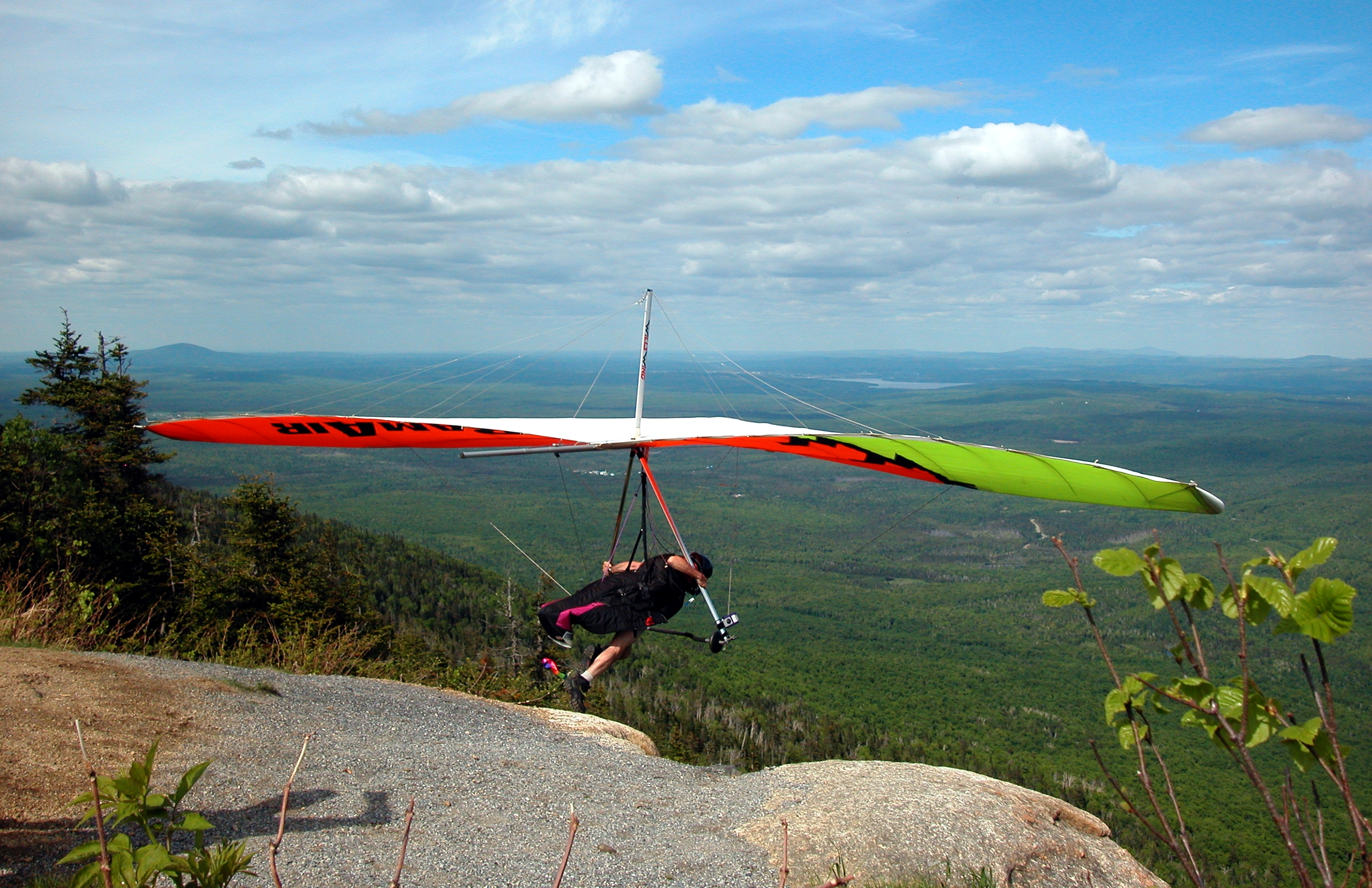 Décollage d'un deltaplane du sommet du mont St-Joseph situé dans le Parc du mont Mégantic